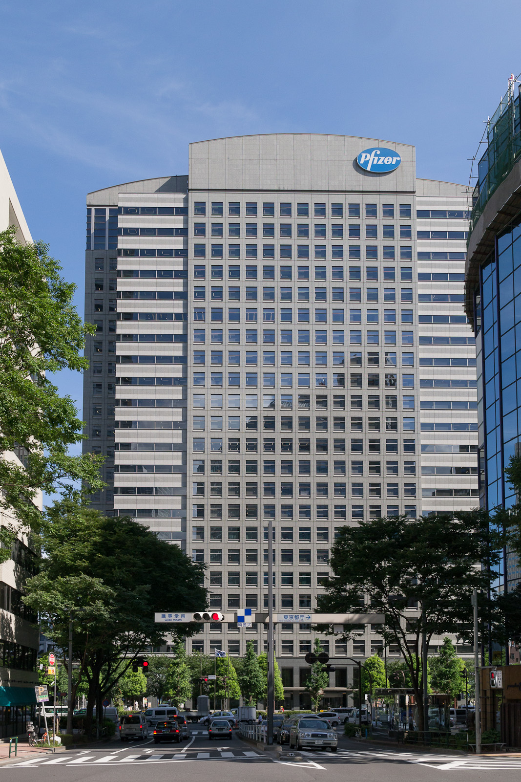 新宿文化クィントビル、東京都渋谷区代々木。